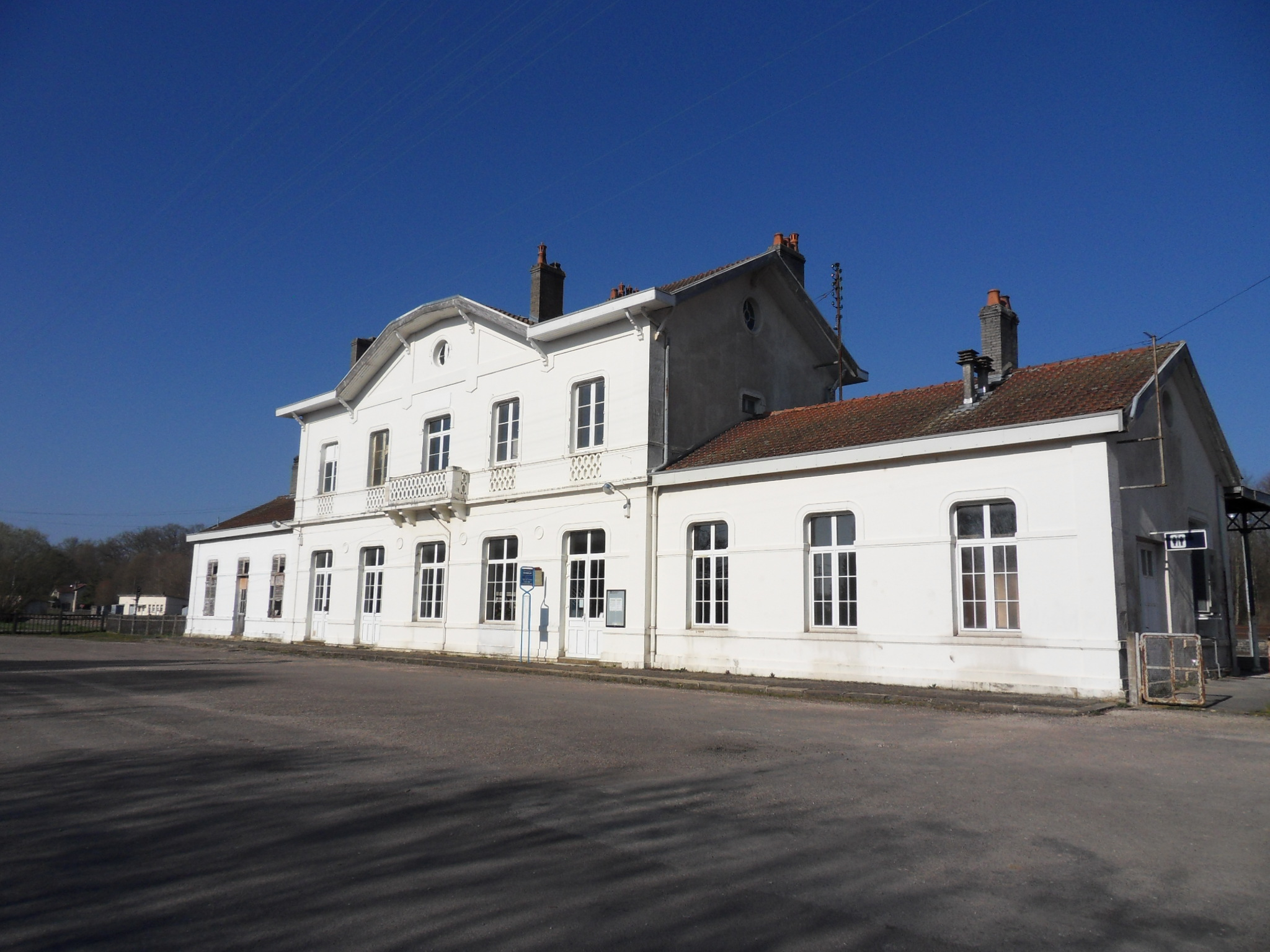 Port-d'Atelier-Amance - Le bâtiment voyageurs.Ligne Paris-Est - Mulhouse-Ville et Ligne d'Aillevillers à Port-d'Atelier-Amance. Vue côté cour voyageurs.